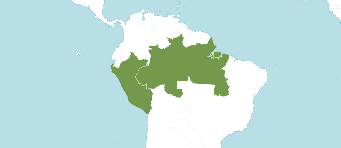 Las zonas verdes muestran los países en los cuales se ubica esta especie.